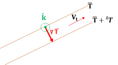 k כיוון הרוח מאונך לגרדיאנט טמפרטורה וכיוון